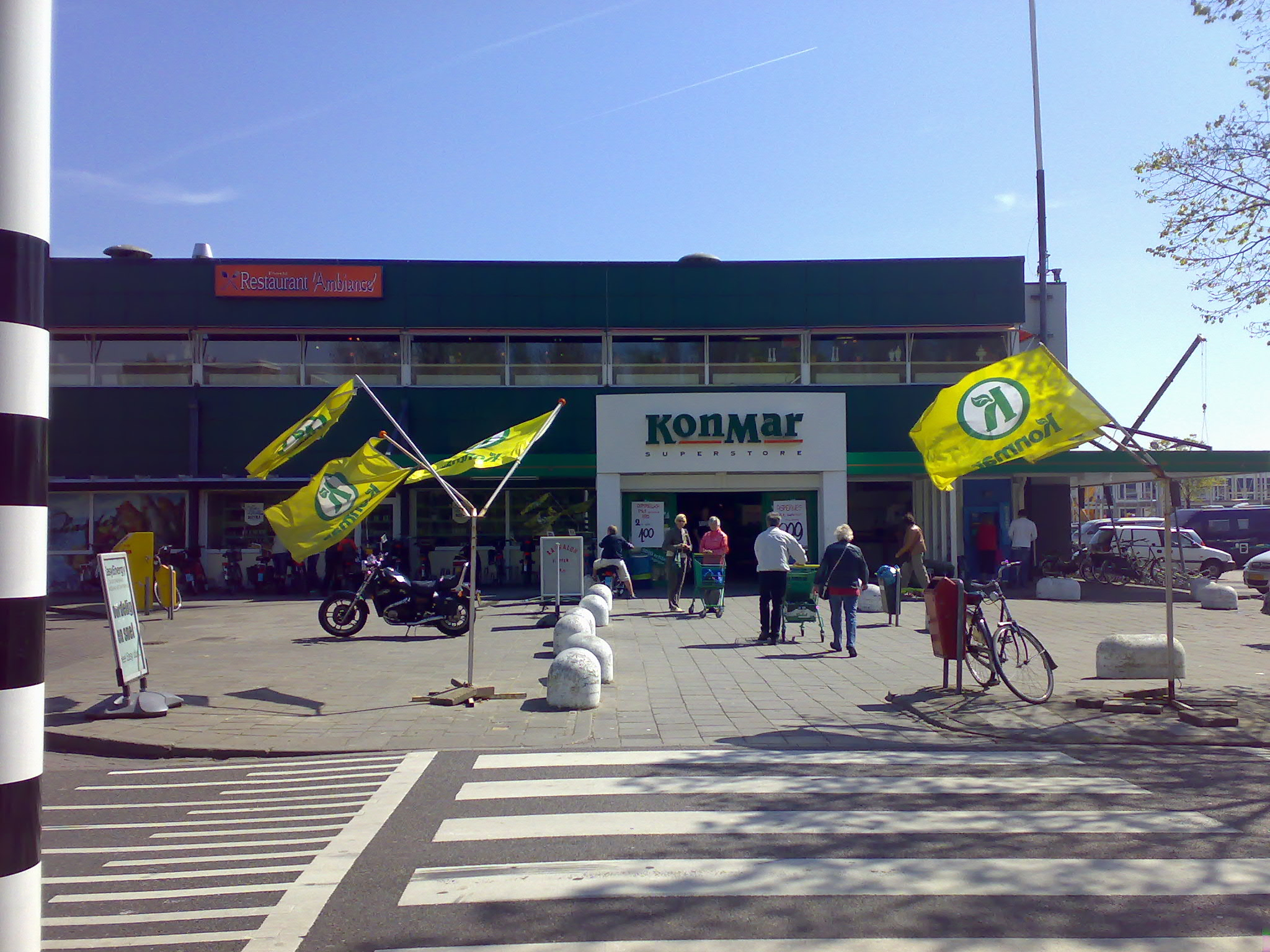 De Konmar-vestiging in Katwijk, de laatste overgebleven Konmar in Nederland. Eind april zal ook deze haar deuren sluiten en plaats maken voor een AH XL.